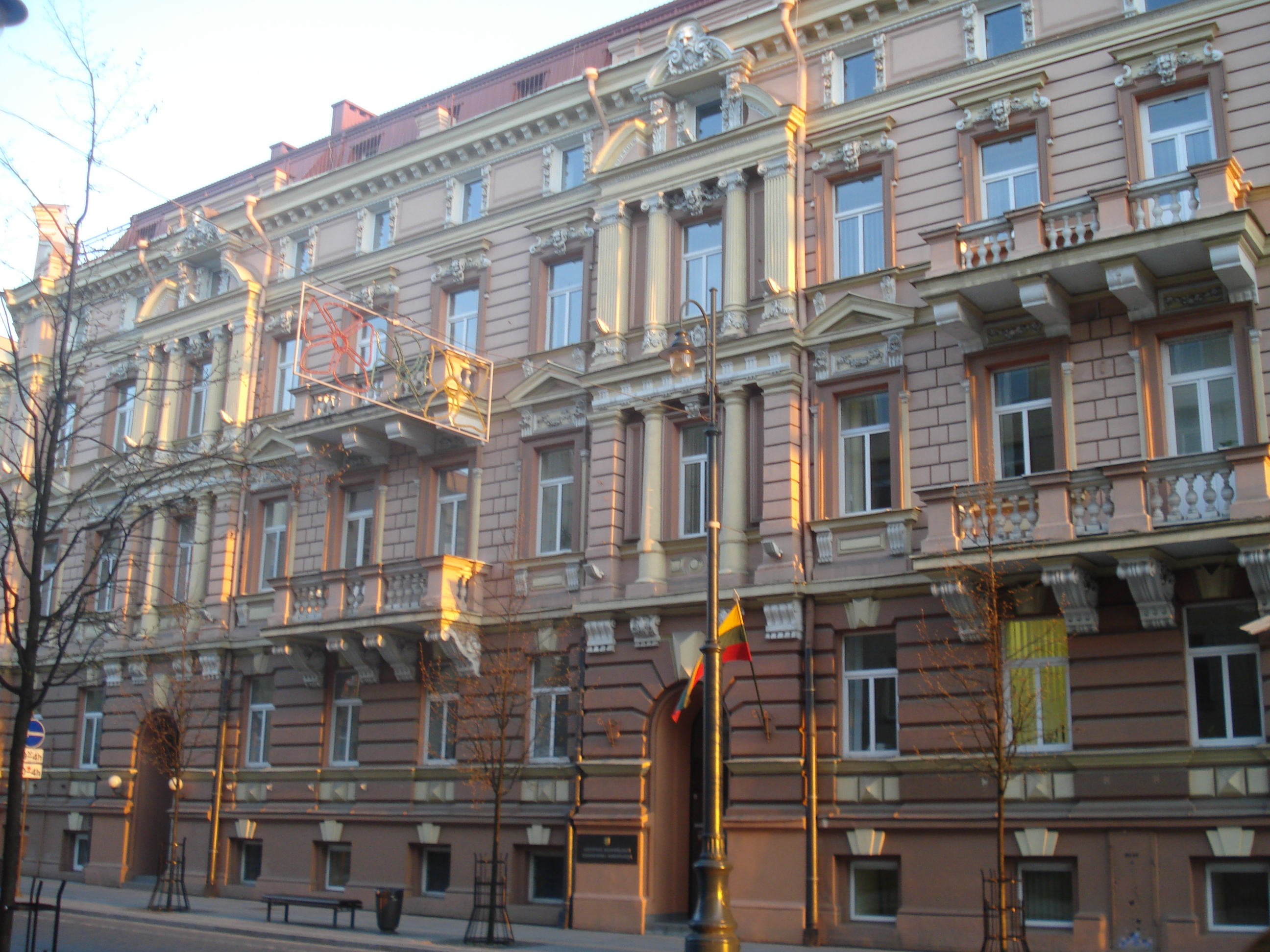 Ministry of Justice. Teisingumo ministerija. Gedimino prospektas 30 / 1